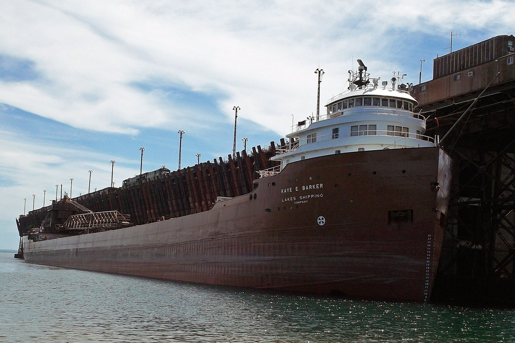 Great Lakes bulk freighter Kaye E Barker.